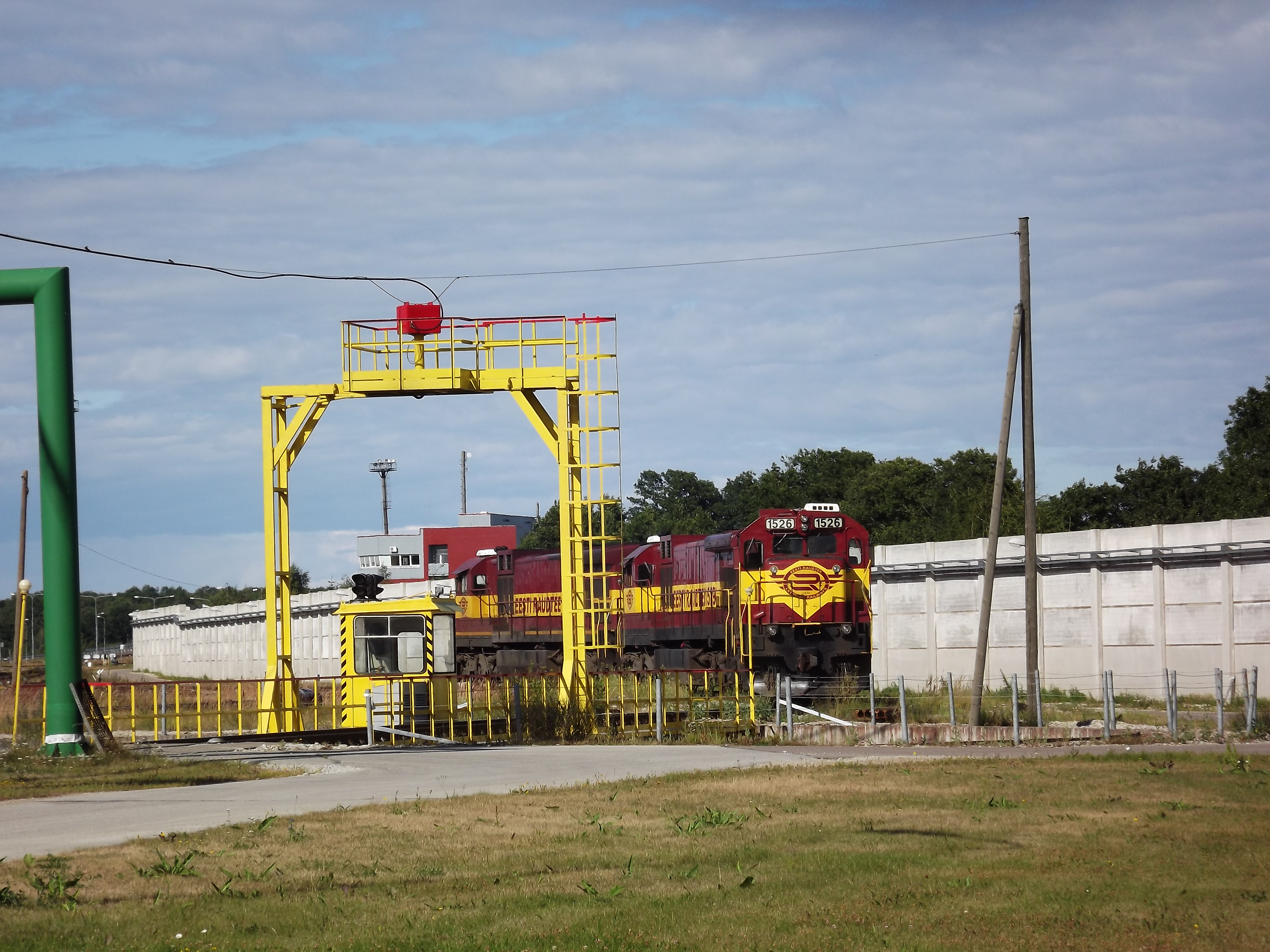 Eesti Raudtee Muuga jaama pöördsild